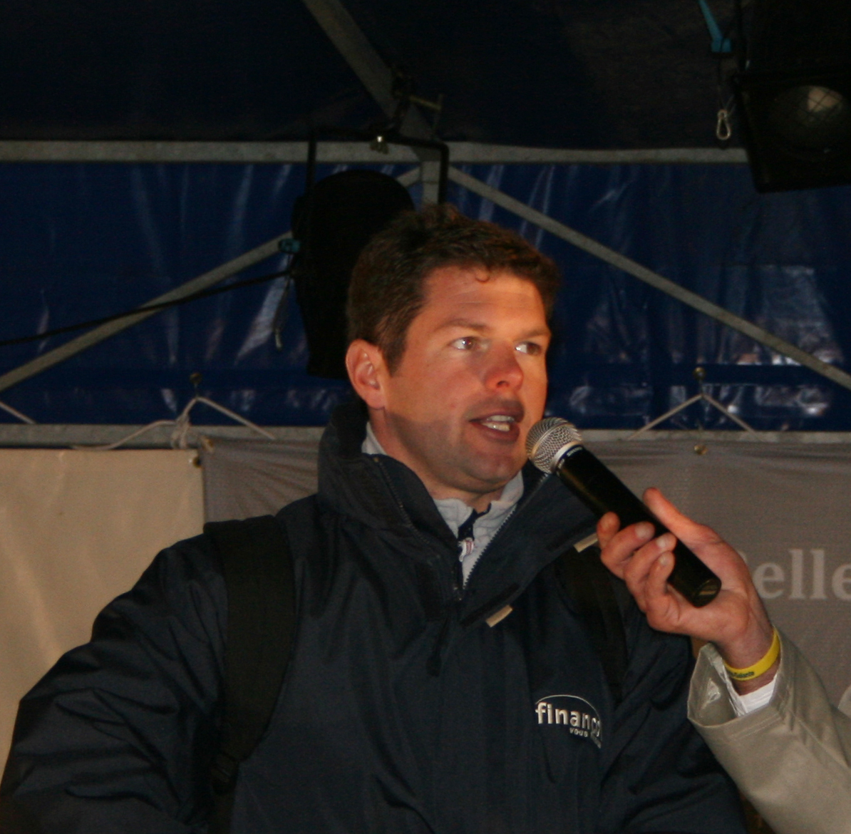 Description =Nicolas Troussel. Soirée présentation des skippers a Belle-Ile lors du Trophée BPE Source =Photo taken by Remi Jouan Date =Mars 2007 Author =Remi Jouan